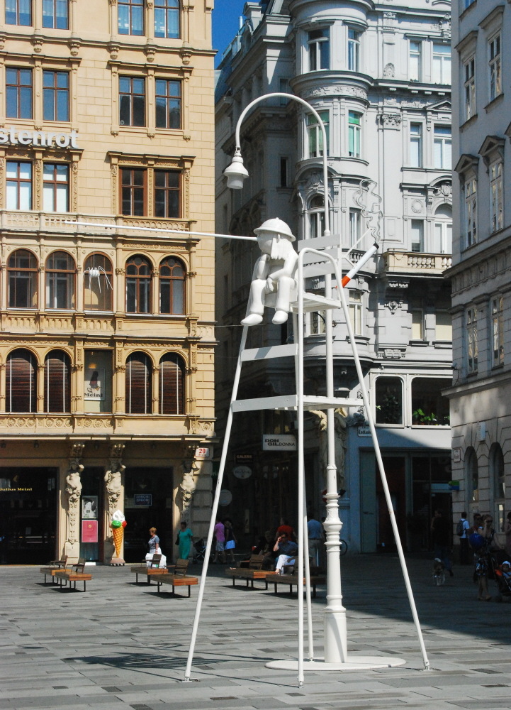 Figur am Graben in Wien-Innere Stadt - Kunst im öffentlichen Raum (KÖR). Tagedieb von Cosima von Bonin.